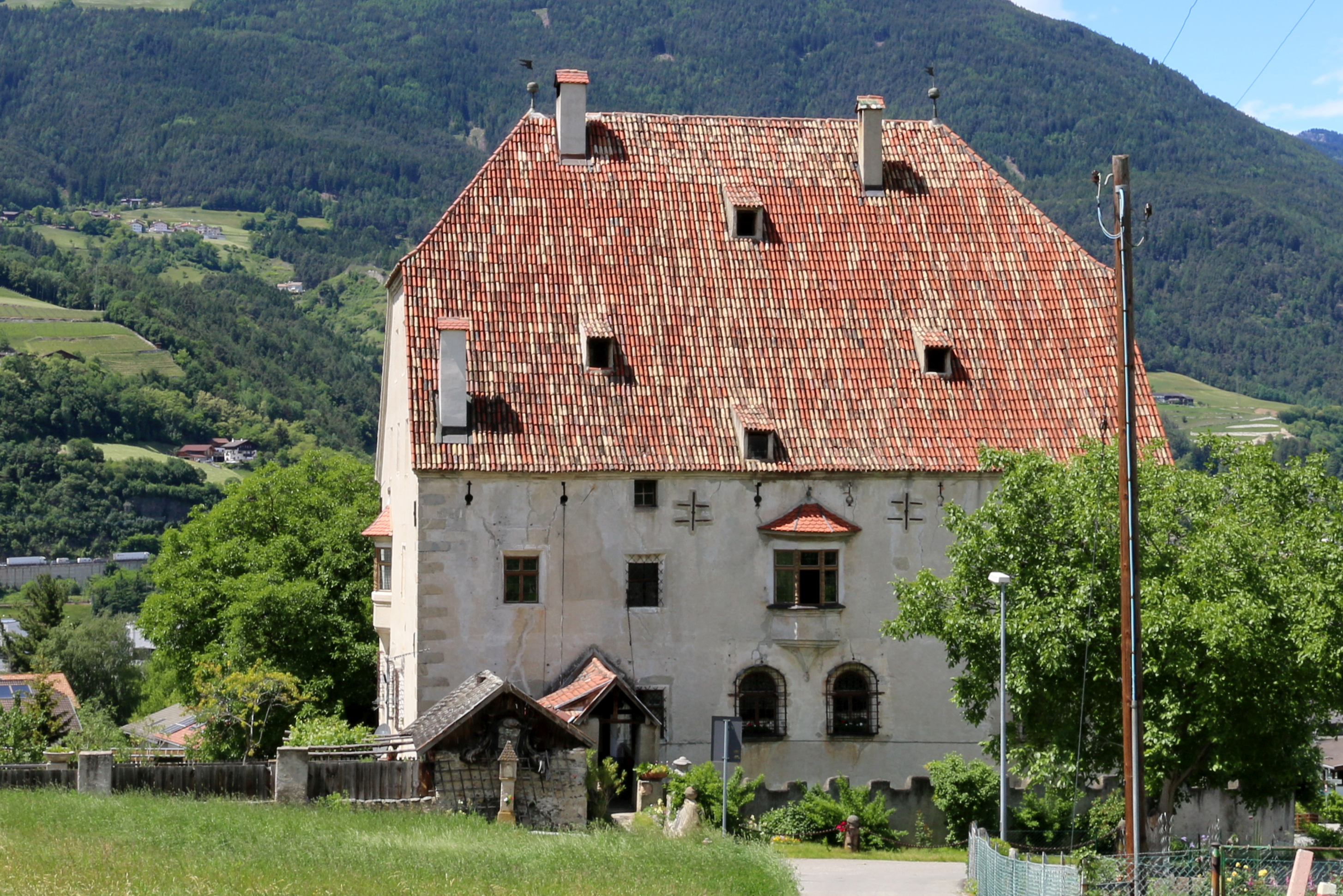 Brixen-Milland, Südtirol: Ansitz Karlsburg